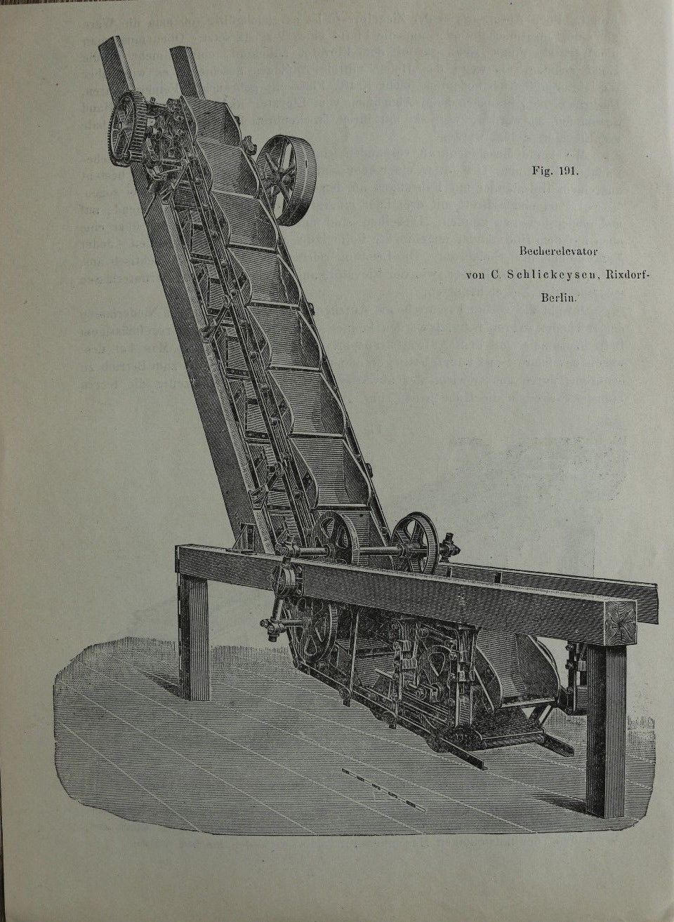 Fabrik C Schlickeysen Rixdorf Berlin, Becherelevator, 1901